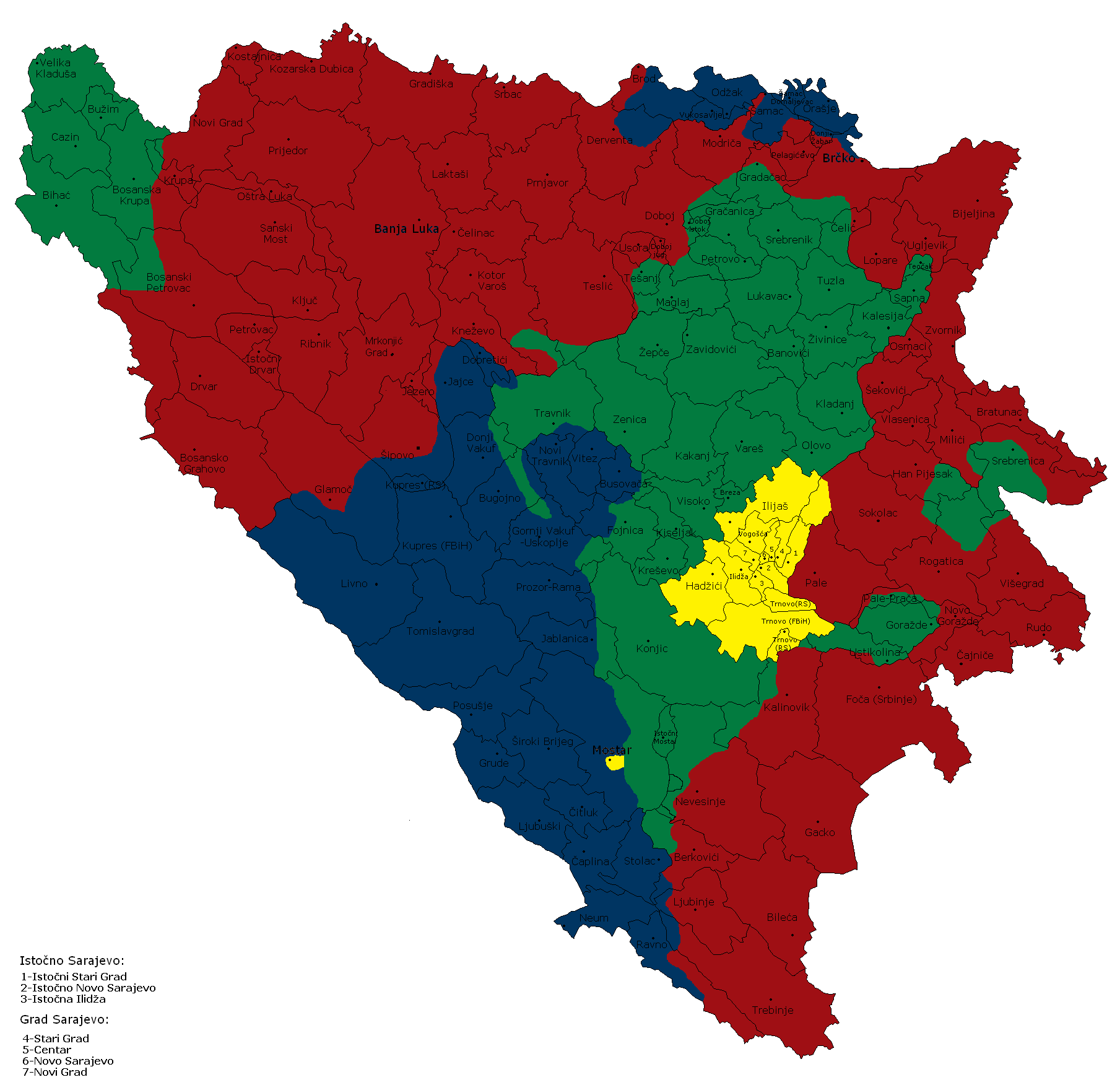 Owen-stoltenberg peace plan